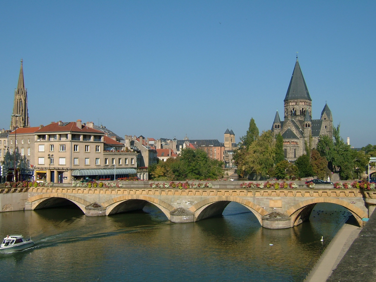 Le Moyen-Pont à Metz (Moselle, Lorraine, France).